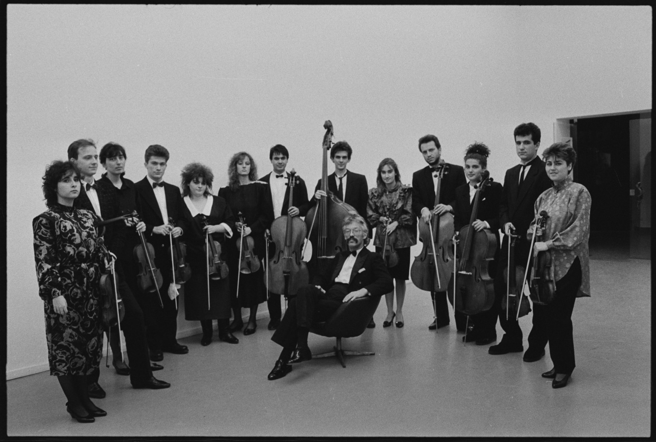 Aleksandar S. Vujić (1945 − 2017) srpski kompozitor, pijanista i dirigent i kamerni orkestar „Sinfonijeta”.Foto: Stevan Kragujević (po odobrenju kćerke Tanje Kragujević)